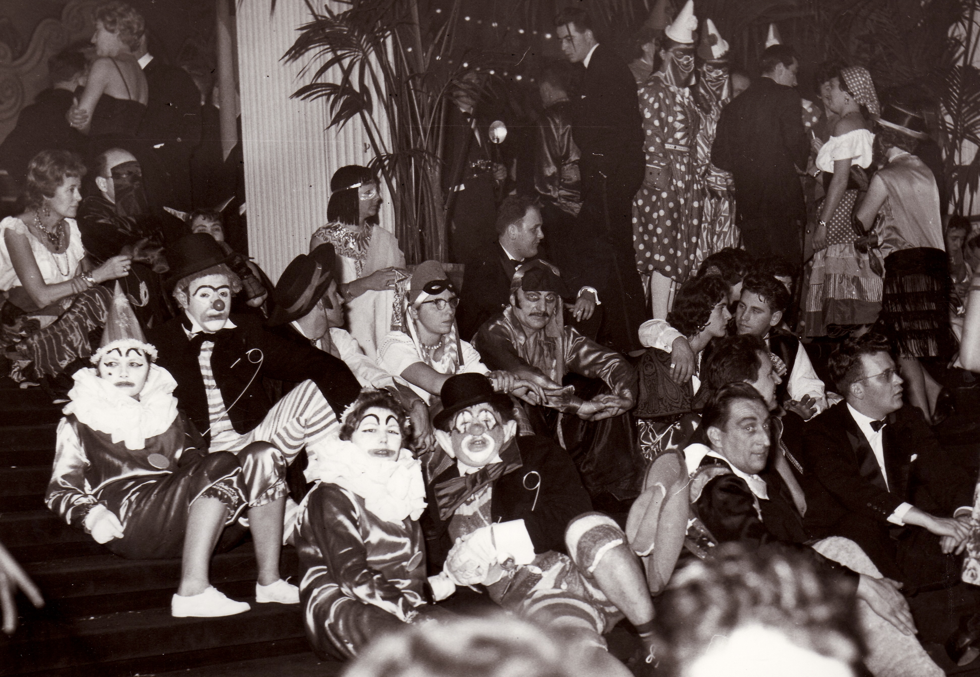 Bal du rat mort